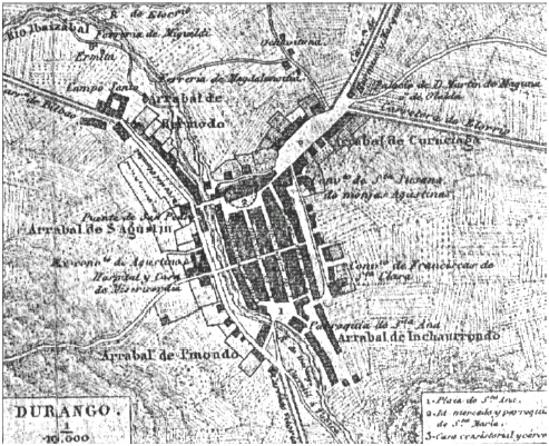 Durangoko planoa, 1857.